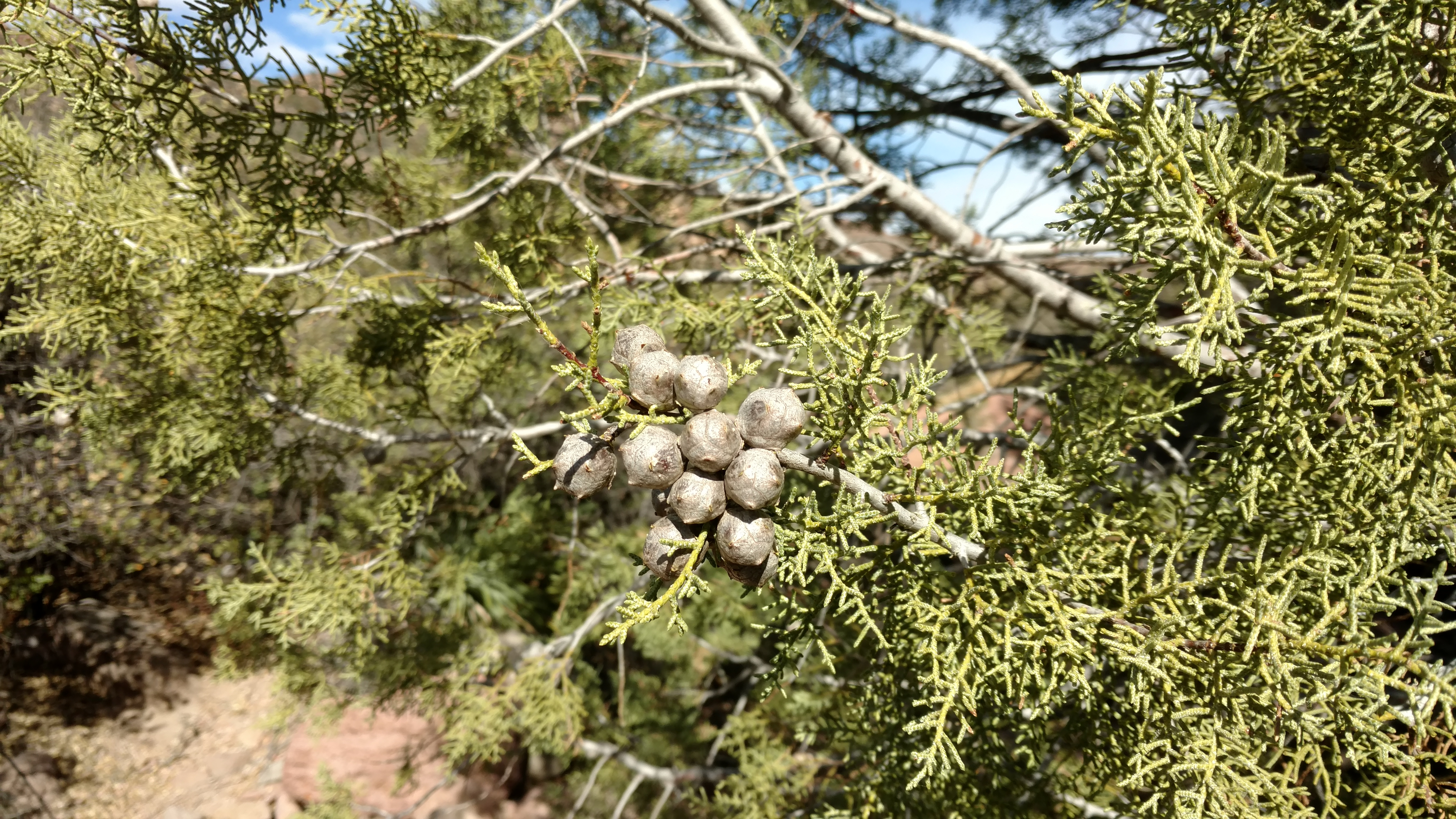 Cupressus revealiana in Sierra Juarez